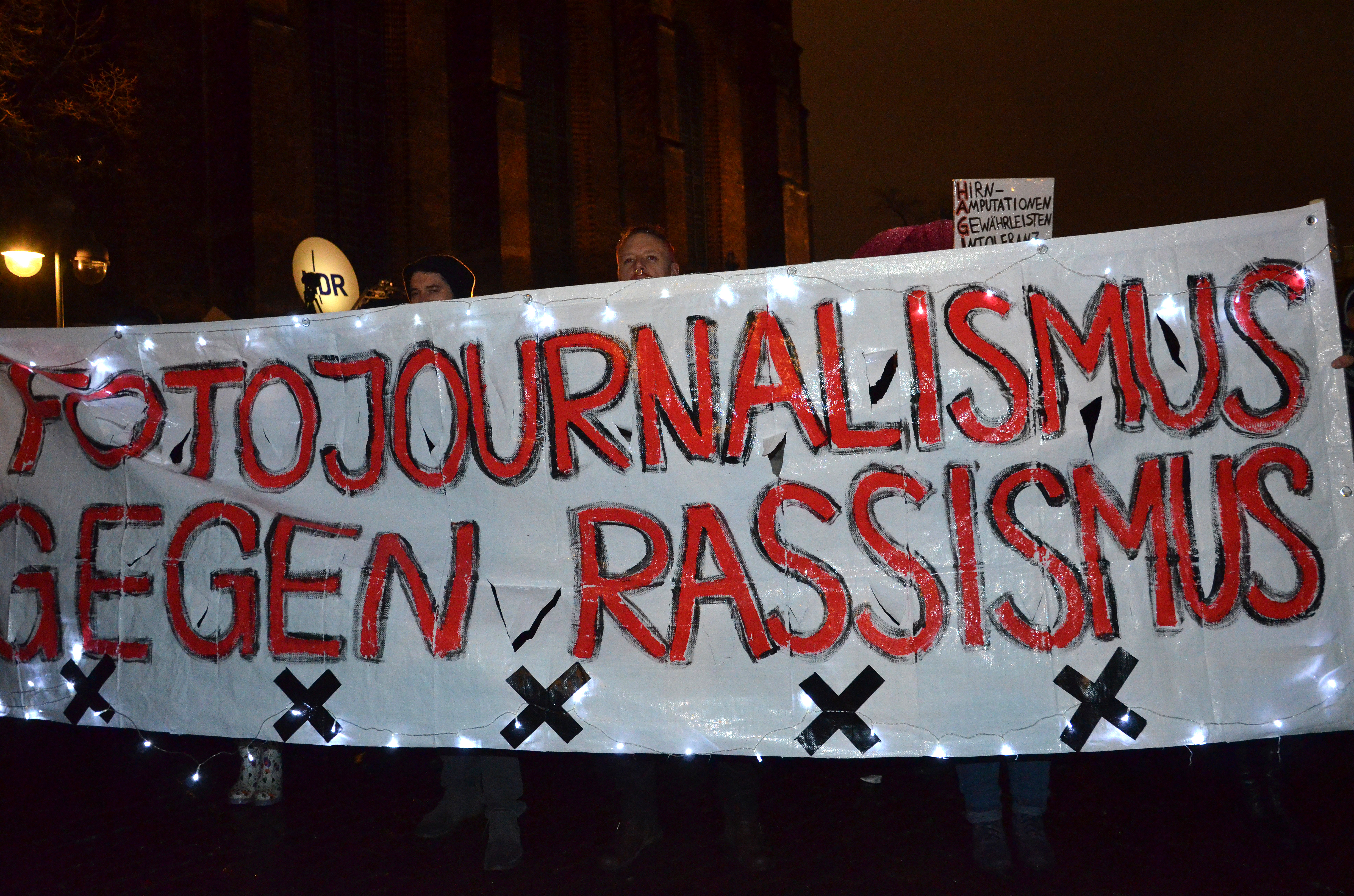 Studierende vom Studiengang Fotojournalismus und Dokumentarfotografie der Fachhochschule Hannover tragen bei der zweiten Anti-Hagida-Kundgebung Bunt statt braun vor der Marktkirche ein Transparent mit der Aufschrift „Fotojournalismus gegen Rassismus“ ...